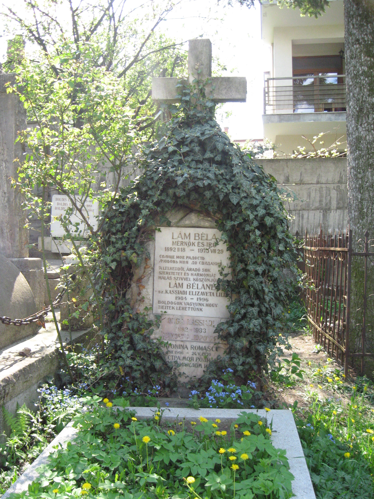 Lám Béla sírja a kolozsvári Házsongárdi temetőben.